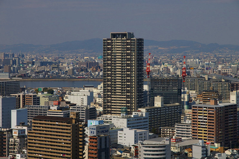 Fukushima Gardens Tower Apartment, Fukushimaku, Osaka City, Japan.